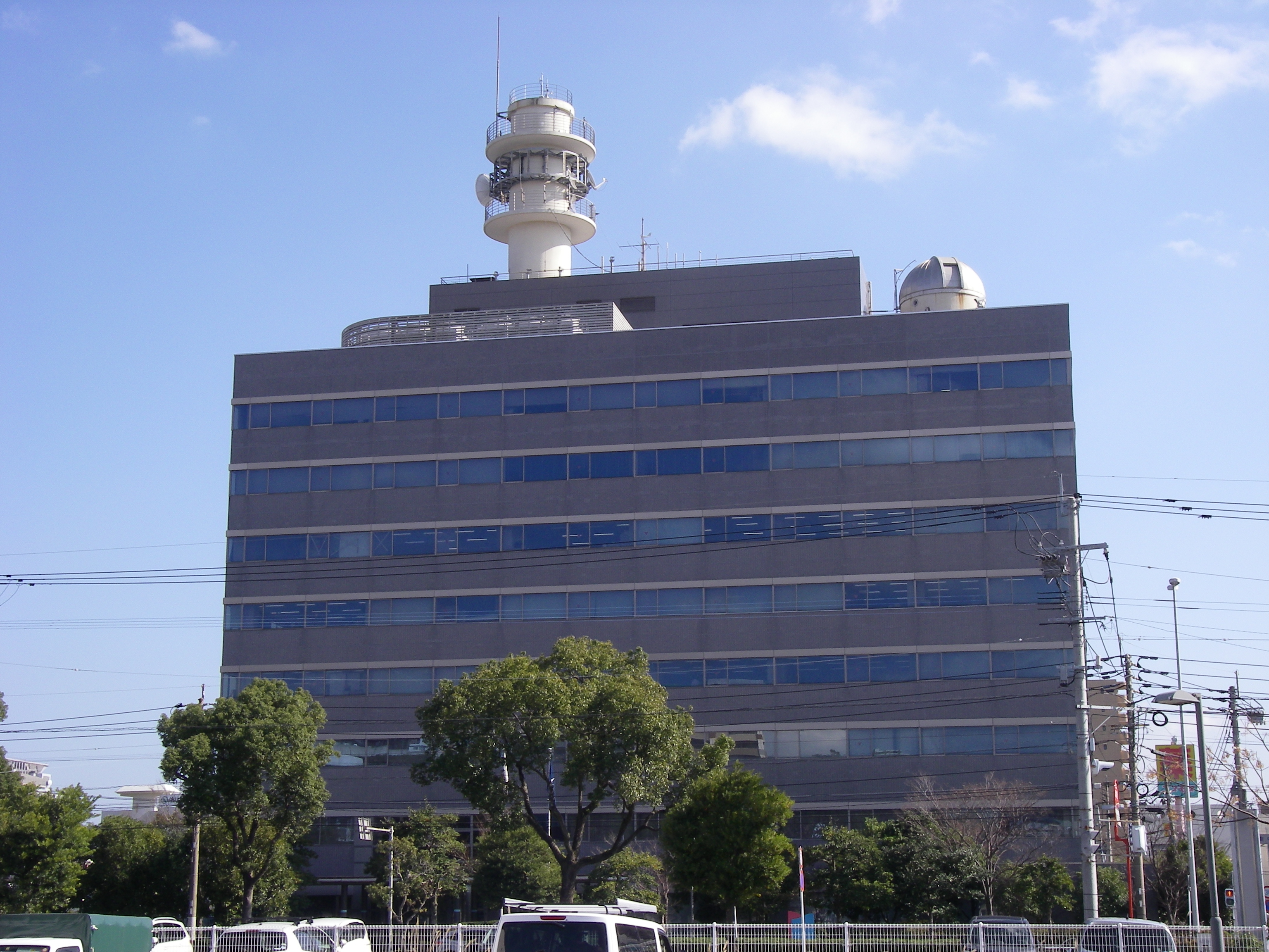 鹿児島第二地方合同庁舎。以下の官署が入居する。 第十管区海上保安本部、鹿児島地方気象台、九州厚生局鹿児島事務所、鹿児島自然保護官事務所、自衛隊鹿児島地方協力本部